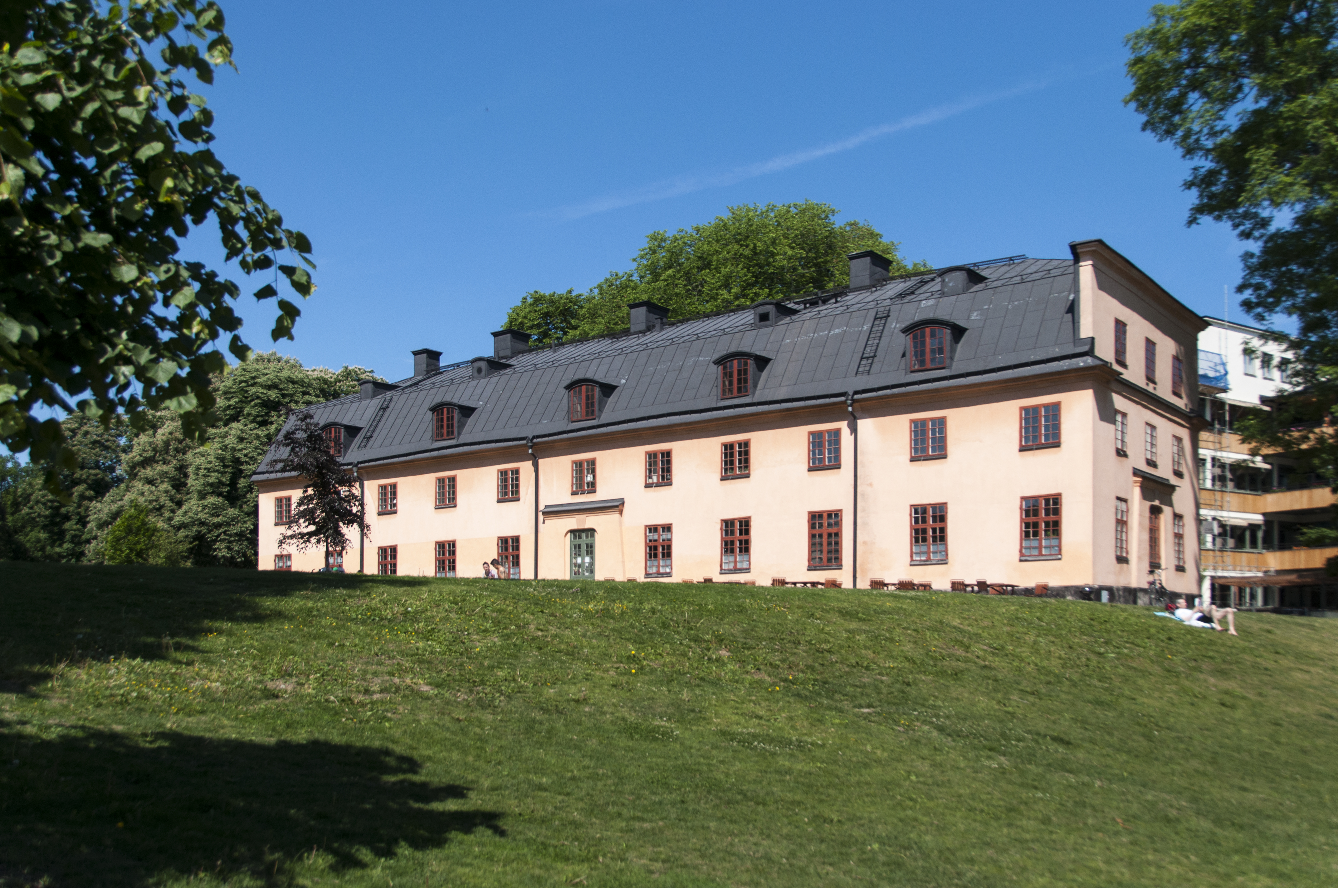 Katarinahuset, Sabbatsberg, Eastmansvägen 35- 37 Nybyggnadsår 1765 - 1767 osignerade ritningar, byggherre Fattighusdirektionen. Ursprungligen uppfört som värdshus för gästande vid Sabbatsbergs Surbrunn. Från 1880 fattighus för fattighjonen inom Katarina församling.